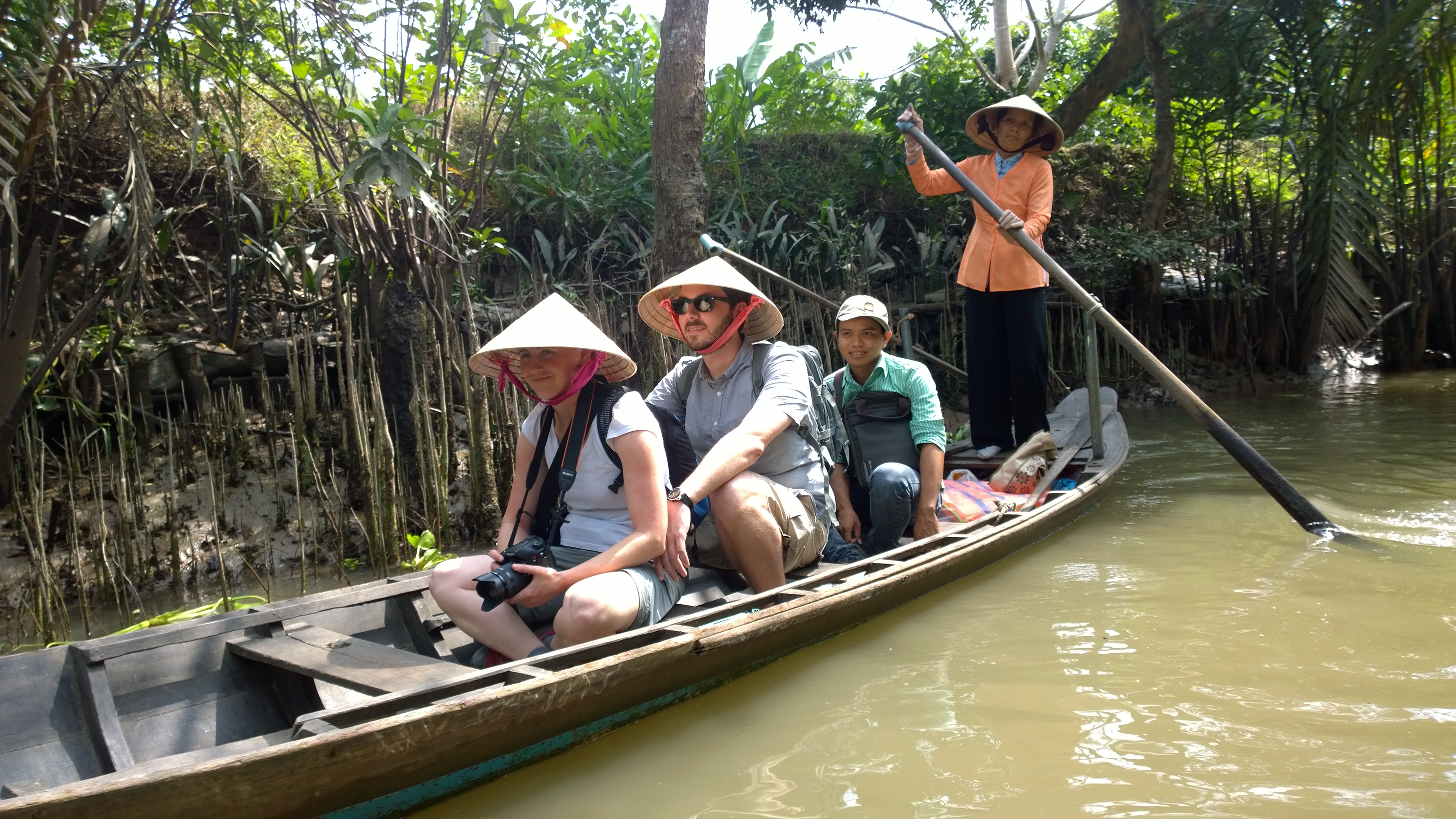 Tân Phong, Cai Lậy, Tiền Giang, Vietnam